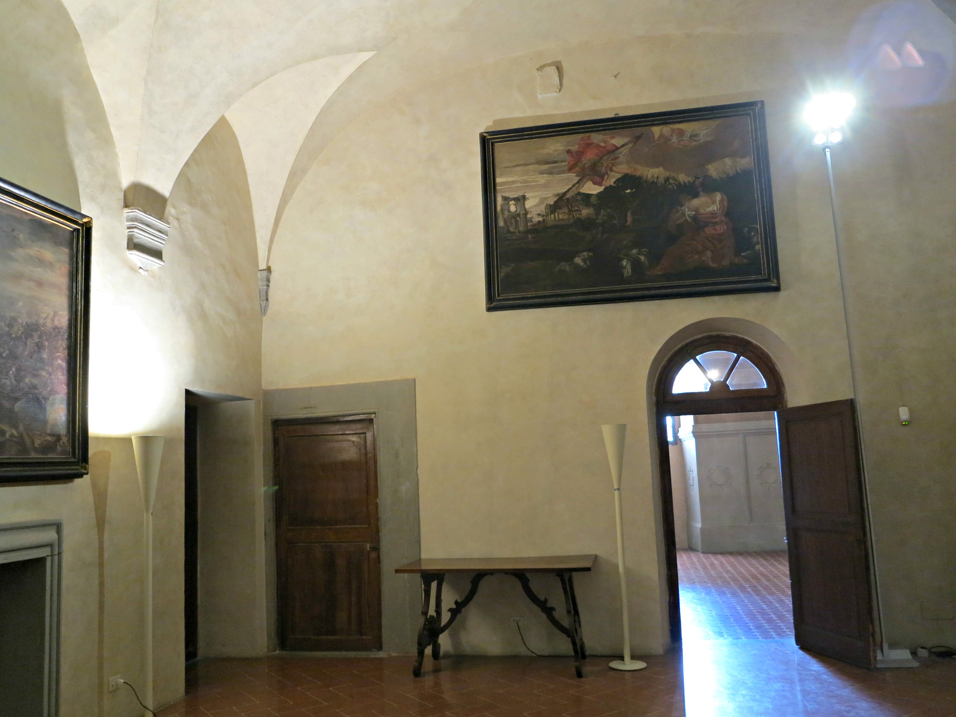 Villa medicea di Poggio a Caiano - MIBAC This is a photo of a monument which is part of cultural heritage of Italy.